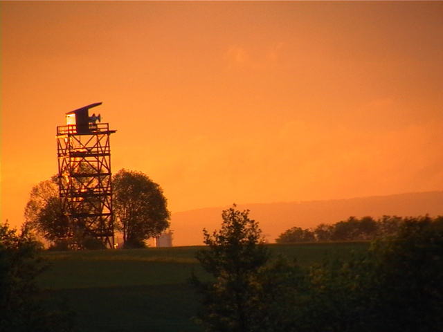 Einer der Antennmasten